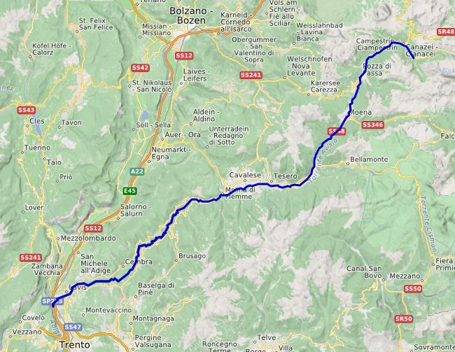 carte réalisée sur umap This map may be incomplete, and may contain errors. Don't rely solely on it for navigation.